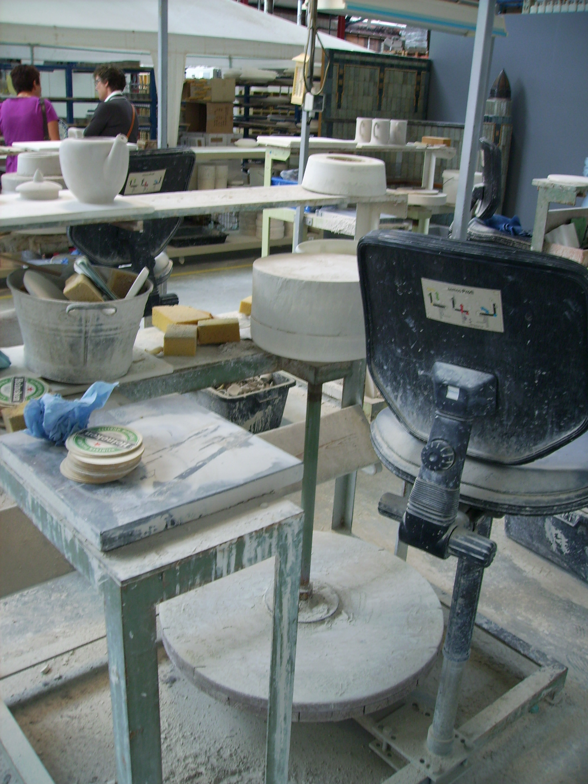 Arbeitsplatz in der Manufaktur. De Porceleyne Fles (vollständig De Koninklijke Delftsche Aardewerkfabriek „De Porceleyne Fles Anno 1653“ N.V., dt. wörtl. Die Königliche Porzellanflasche, engl. bekannt als Royal Delft) ist eine Delfter Porzellanmanufaktur mit einem Porzellanmuseum. Die 1653 gegründete Manufaktur ist ursprünglich für ihre als Delfter Blau oder Delfter Ware bezeichneten Fayencen bekannt.